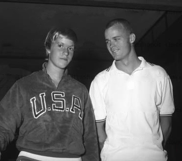 Il campione di nuoto Jeff Farrell ripreso insieme a Molly Botkin in un interno del villaggio Olimpico